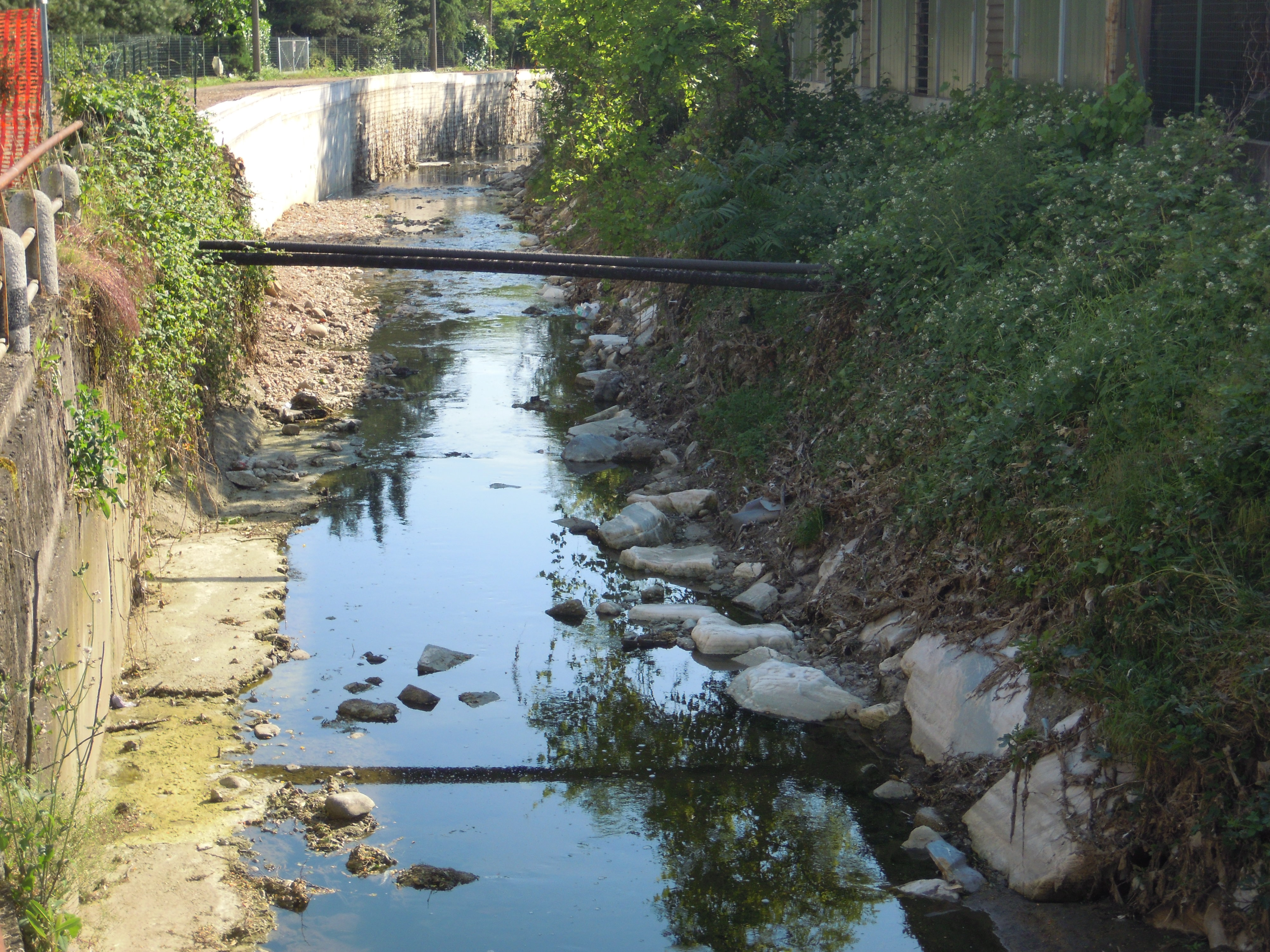 Vista del torrente Arno a Samarate (VA) dalla via San Protaso